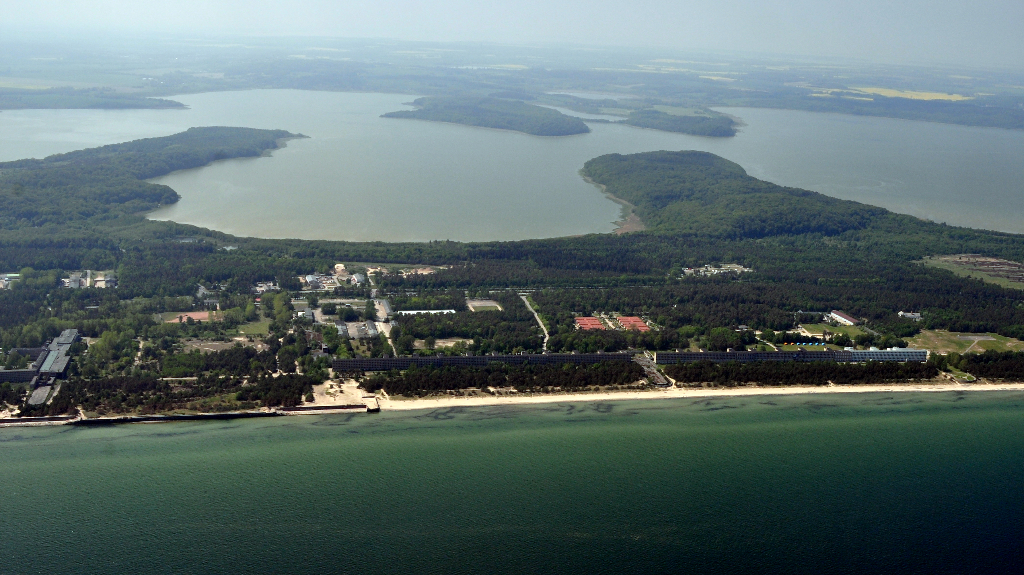 Die Bilder wurden von mir während eines einstündigen Rundflugs ab Flugplatz Güttin am 21. Mai 2011 aufgenommen. Die Bildbeschreibung steht im Dateinamen. Aufgenommen mit einer Nikon D5000 durch das Seitenfenster des Flugzeugs. – Mittig im oberen Bilddrittel das Naturschutzgebiet „Pulitz“.